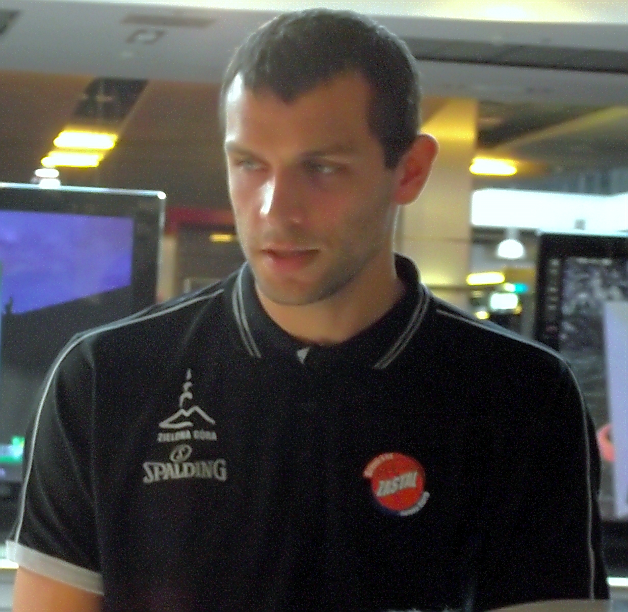 Marcin Chodkiewicz podczas prezentacji Zastalu Zielona Góra przed sezonem 2011/12.